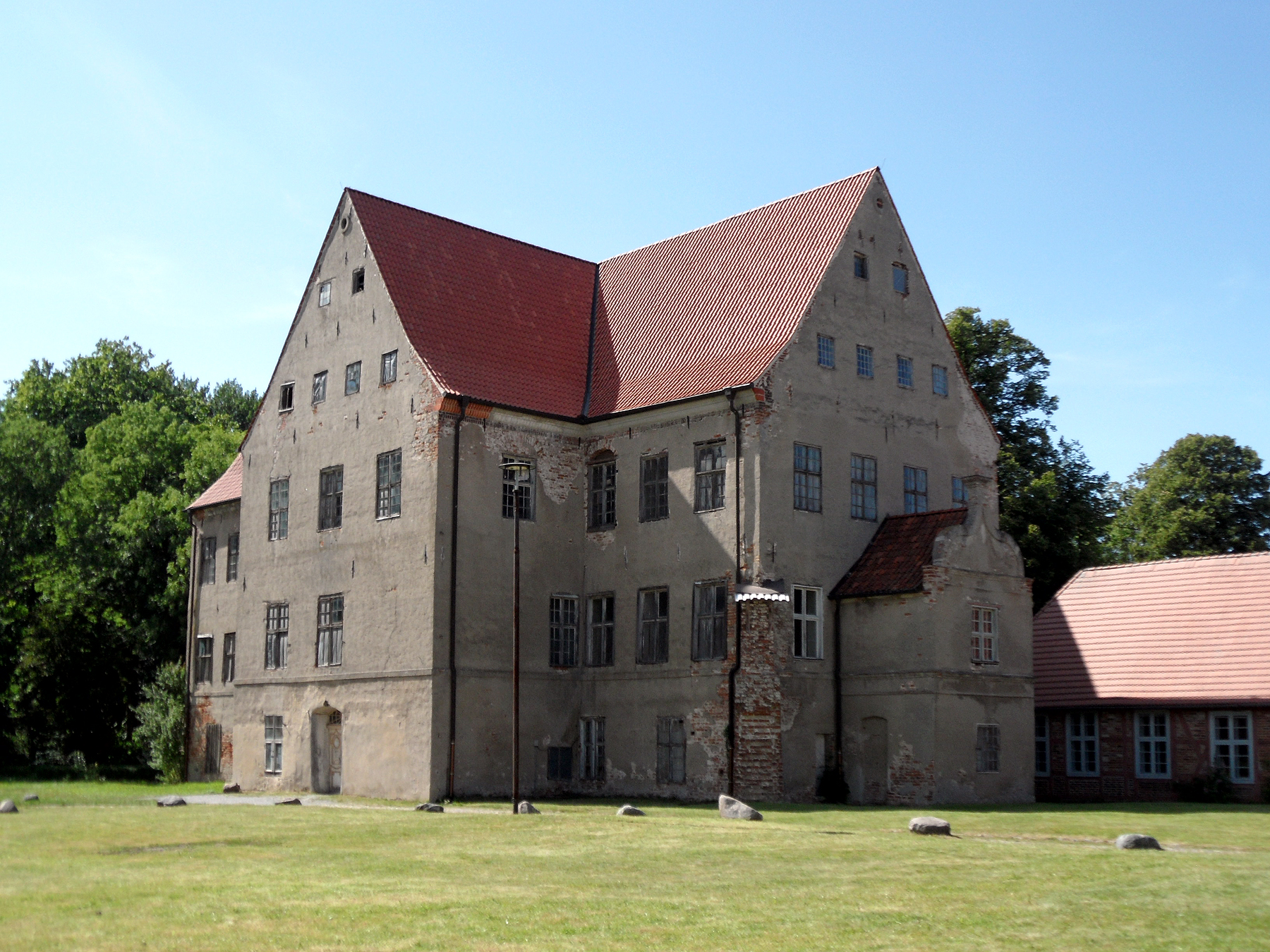 Schloss Ludwigsburg (Vorpommern)